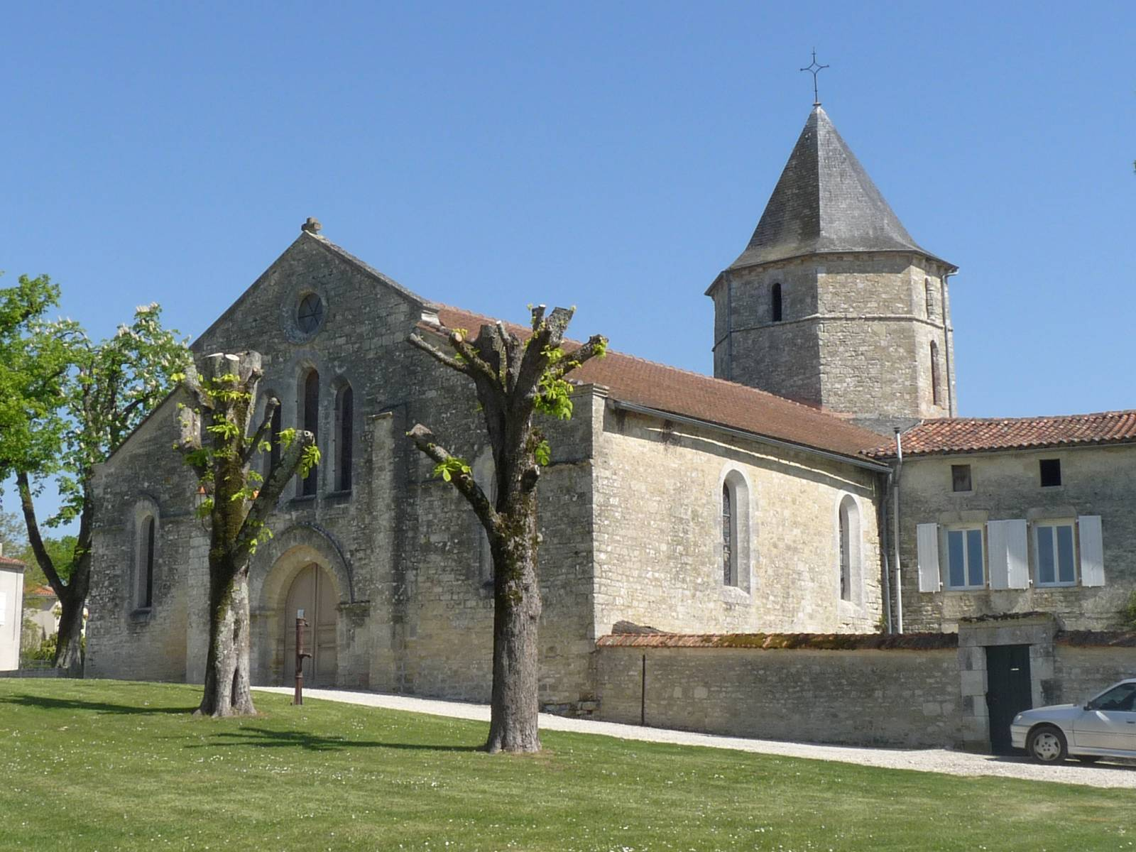 Eglise de Villejésus, Charente, France